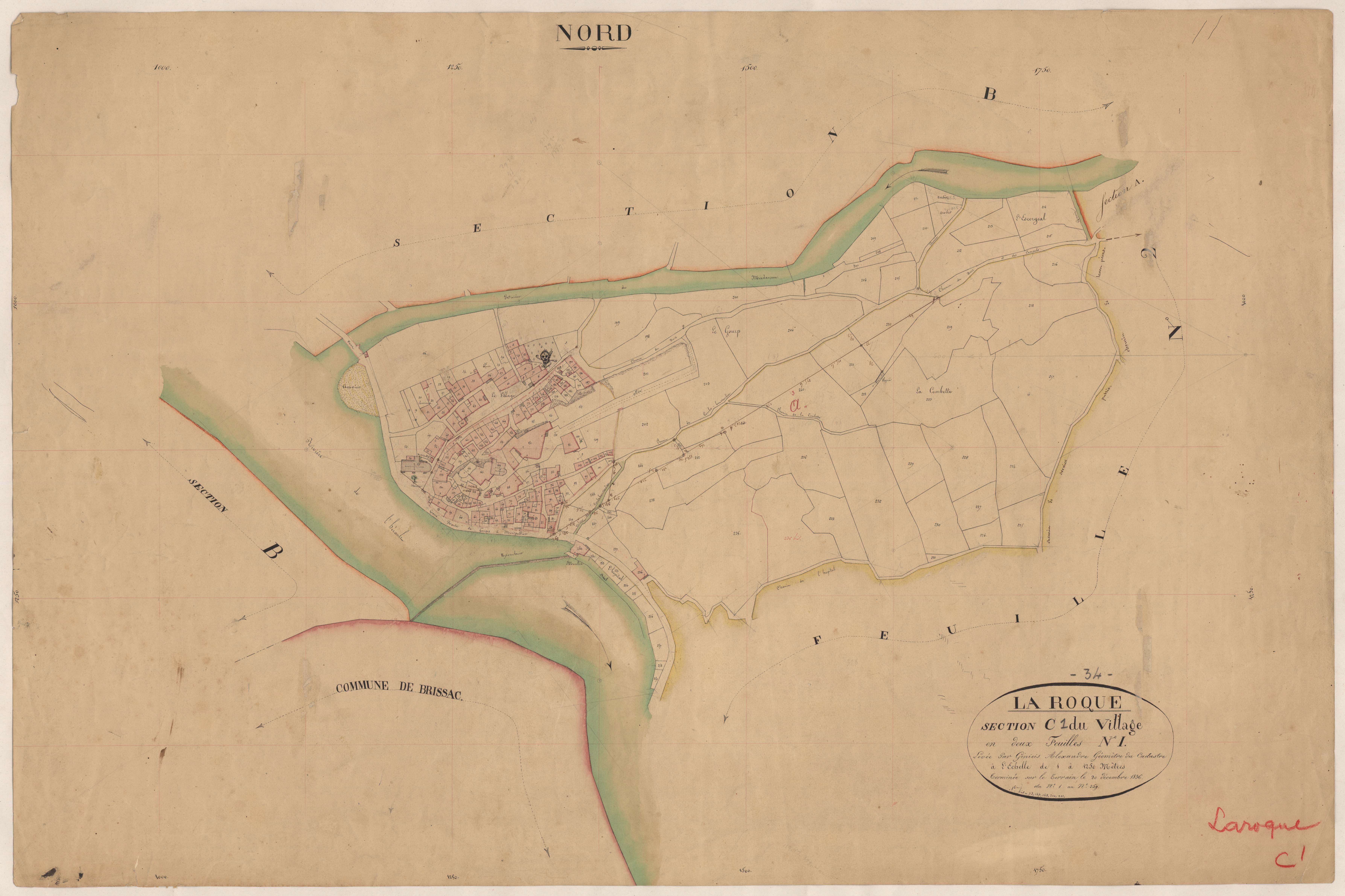 Laroque. - Cadastre napoléonien : plan de la section C1 du Village